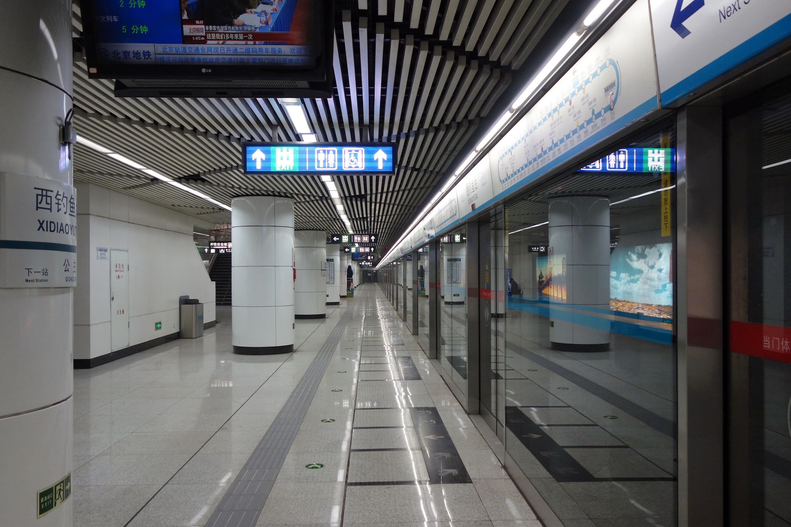 北京地铁10号线西钓鱼台站站台